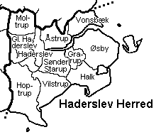 Als Nørre Herred, Sønderborg Amt, Danmark.